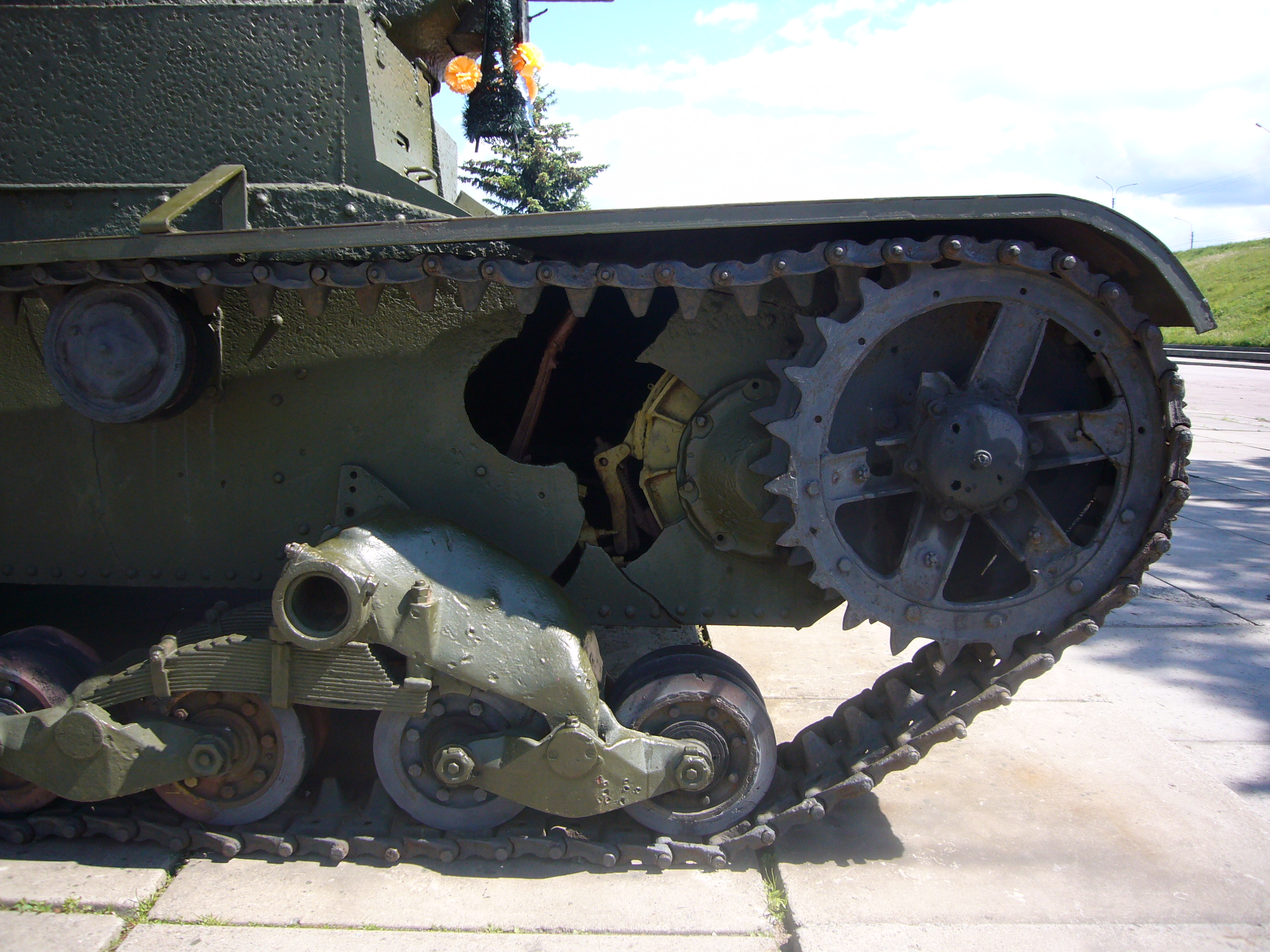 Т-26 у диорамы «Прорыв блокады Ленинграда». Пробоина крупным планом